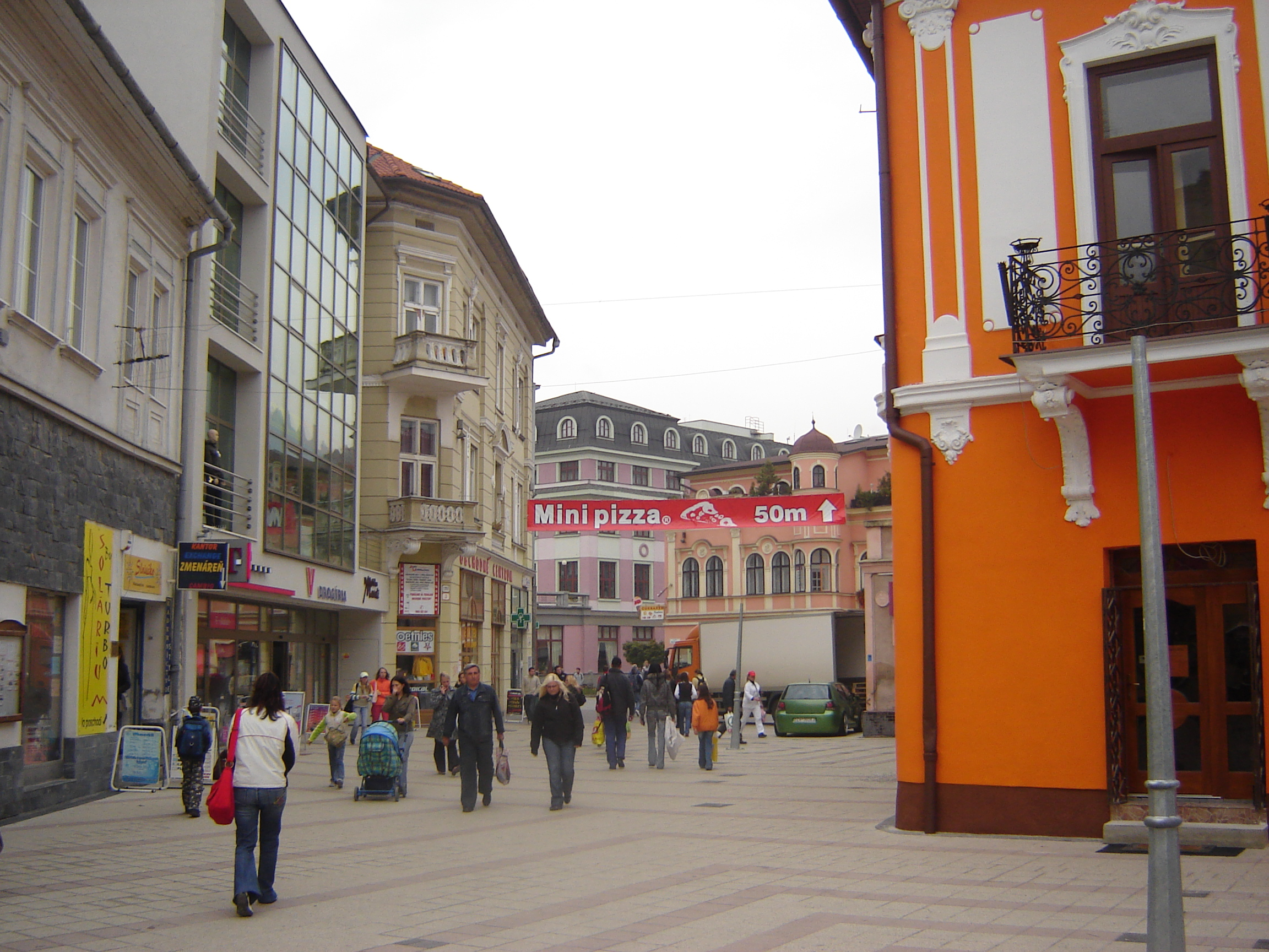 Centrum Ružomberka